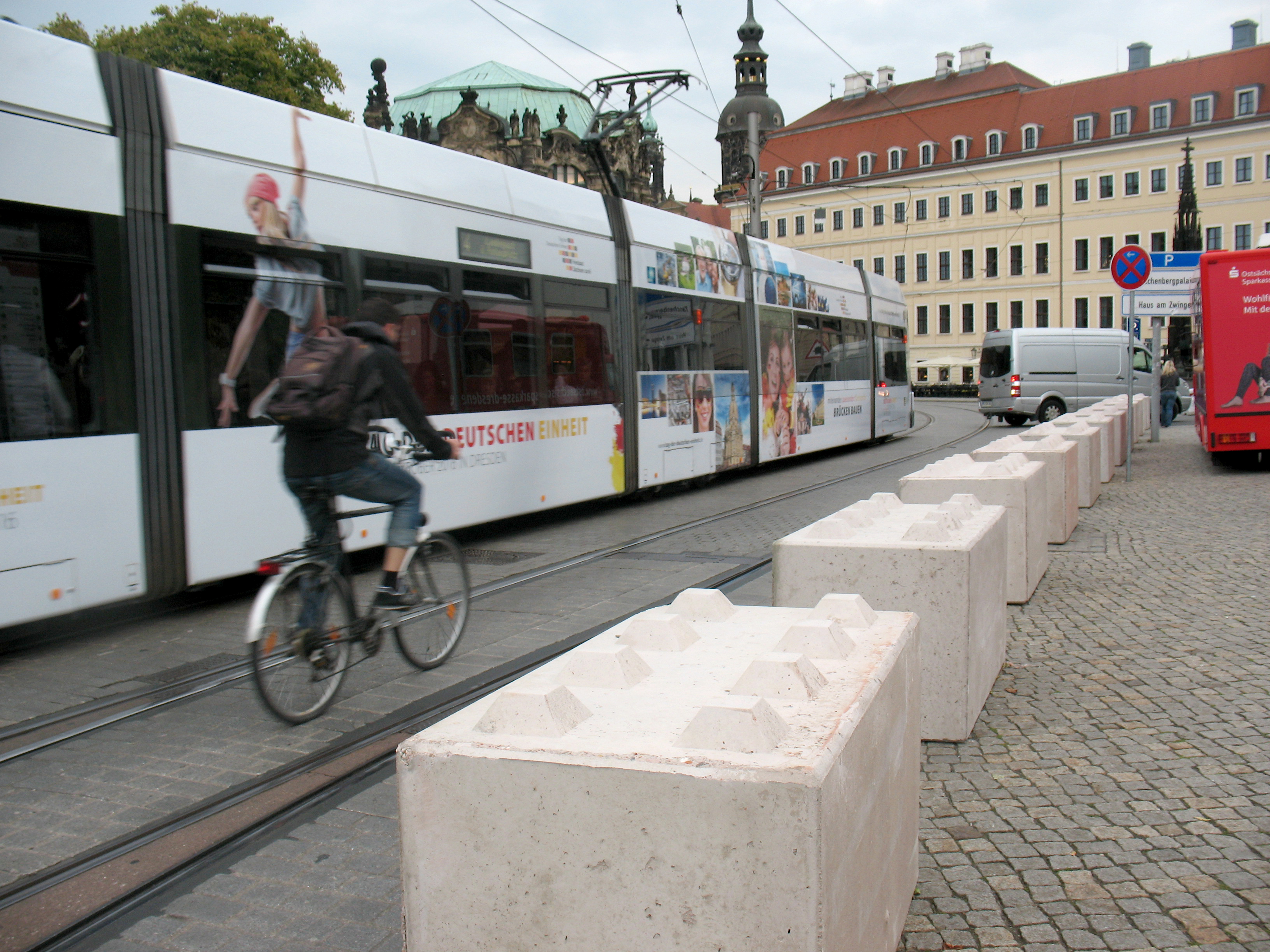 + 00000000001_Image_Tag der Deutschen Einheit_Dresden_Sachsen_Germany_Nizza Sperre_Postplatz